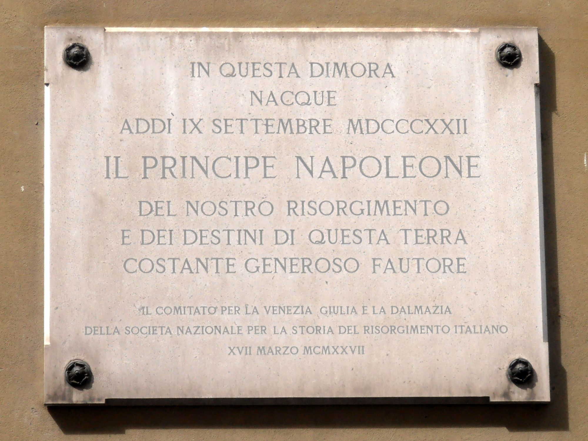 Italy - Trieste - Via Bonaparte 1 - La targa che ricorda la nascita di Napoleone Giuseppe